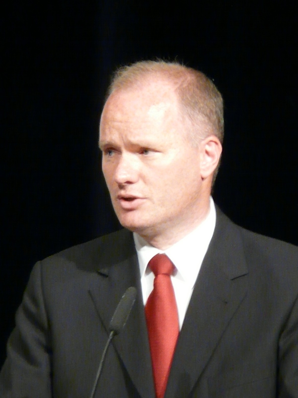 beschnittene Version von